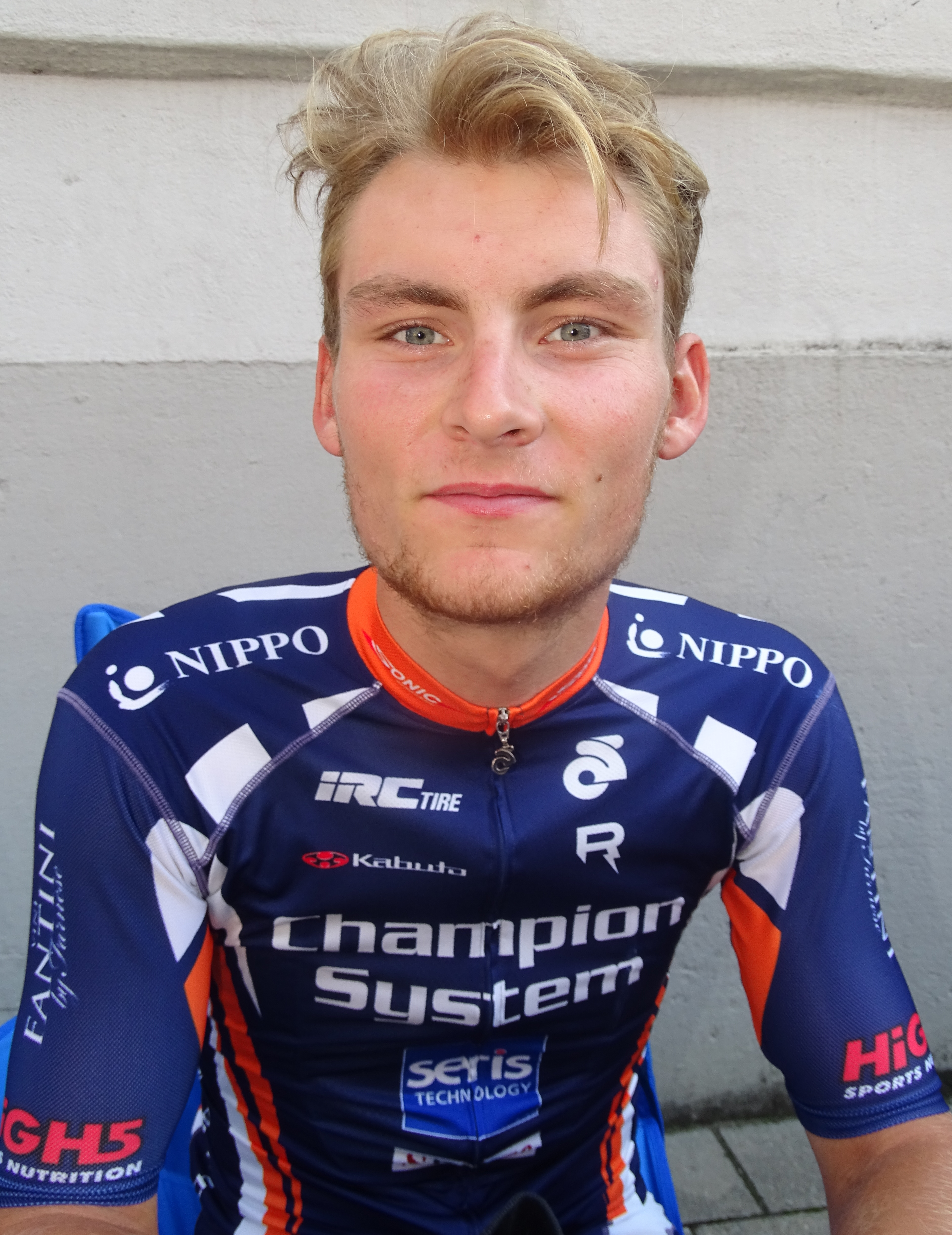 Reportage réalisé le dimanche 30 août à l'occasion du départ et de l'arrivée de la Coupe Sels 2015 à Merksem (Anvers), Belgique.